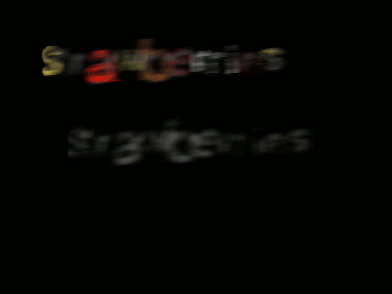 Beim Denken oder beim Zuhören, wie jemand singt oder spricht, werden die Wörter durch Untertitel begleitet, wobei jeder einzelne Buchstabe seine Farbe hat. Vermutlich behält jeder Buchstabe seine eigene Farbe bei, anstatt die Farbe des Anfangsbuchstabens zu übernehmen, weil ich auch die projizierte Version der Graphem-Farb-Synästhesie habe und dabei jeder Buchstabe seine eigene Farbe hat... Die Untertitel haben auch achromatische Anteile: dünne, dunkle Linien sowie breite, helle Anteile. Unten ist der helle, breite Anteil extrahiert.